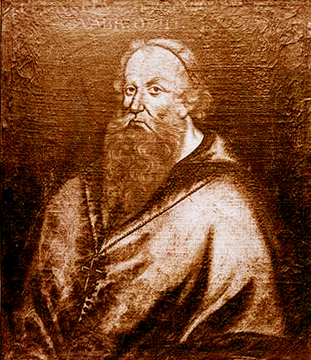 Pierre d'Aigrefeuille, évêque de Tulles, Vabres, Clermont, Uzès, Mende et Avignon, comte de Gévaudan